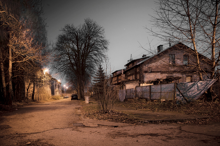 Kolonie Jeremenko Ostrava Vítkovice